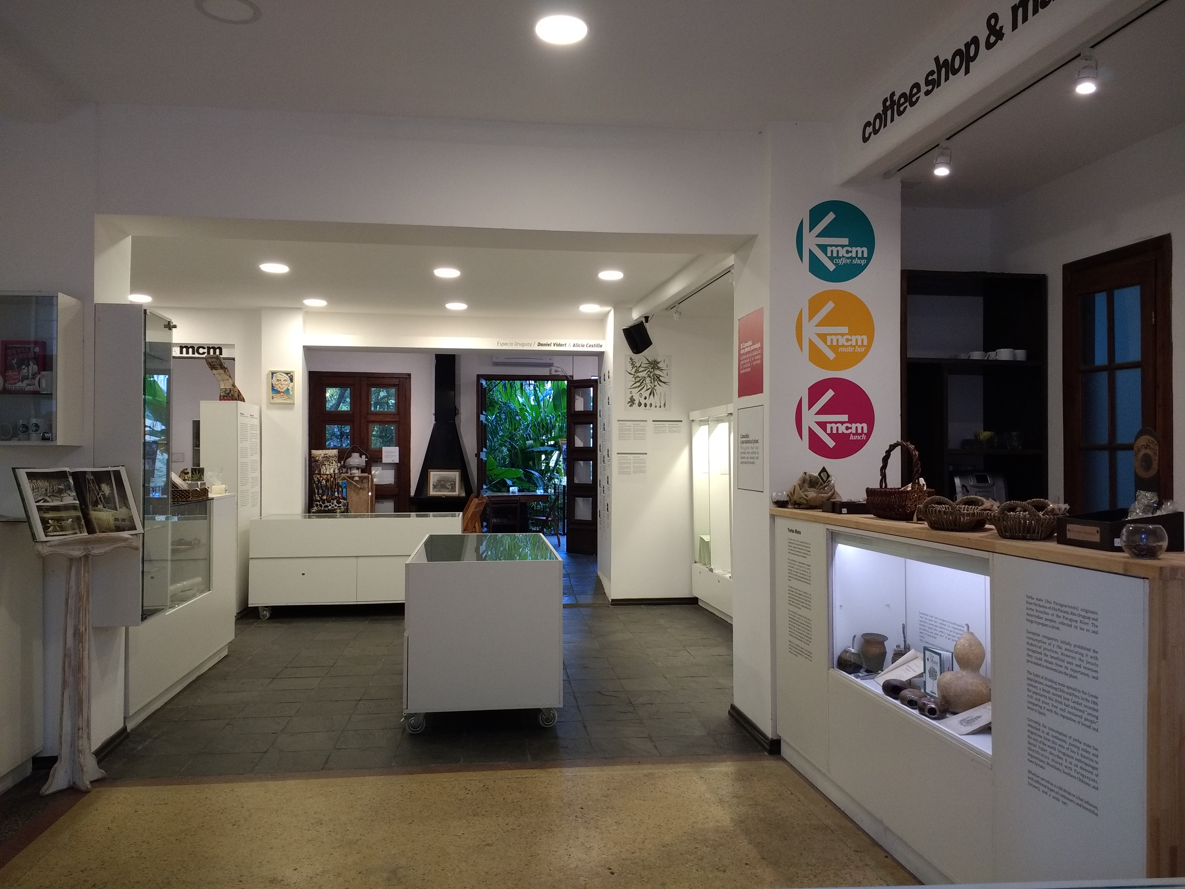 Museo del Cannabis de Montevideo